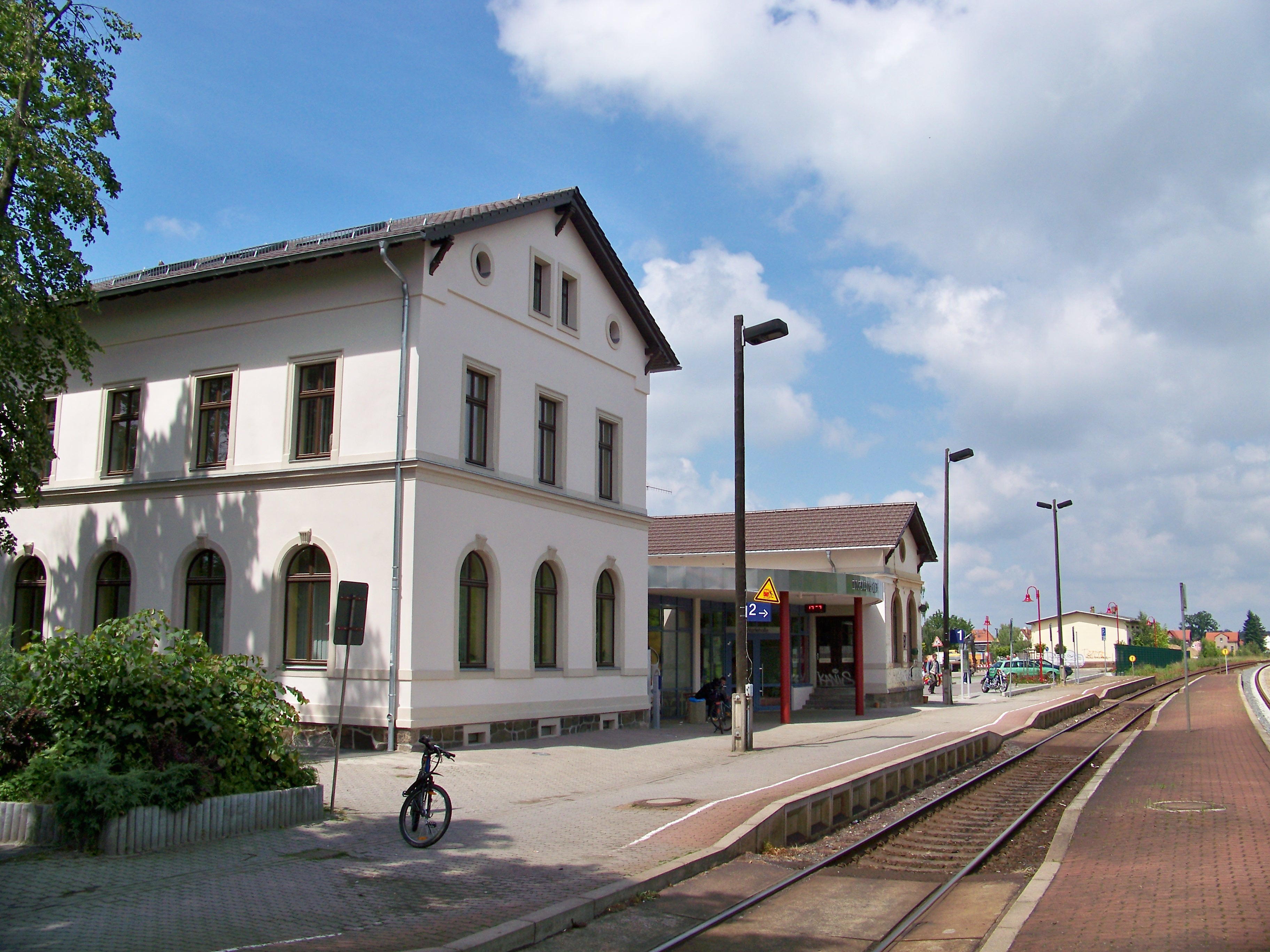 Bahnhof in Naunhof in Sachsen